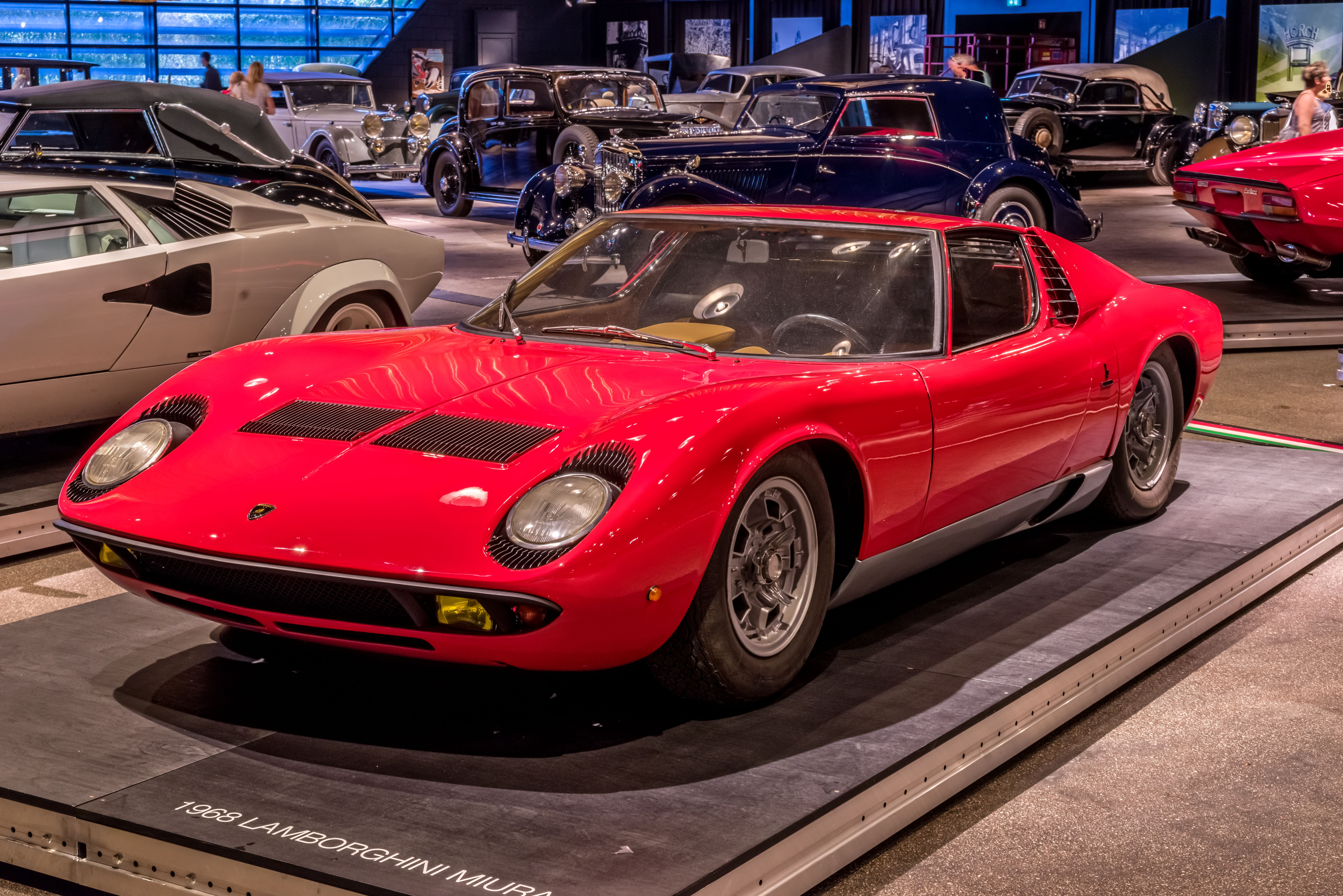 Das Volante Oldtimermuseum in Kirchzarten